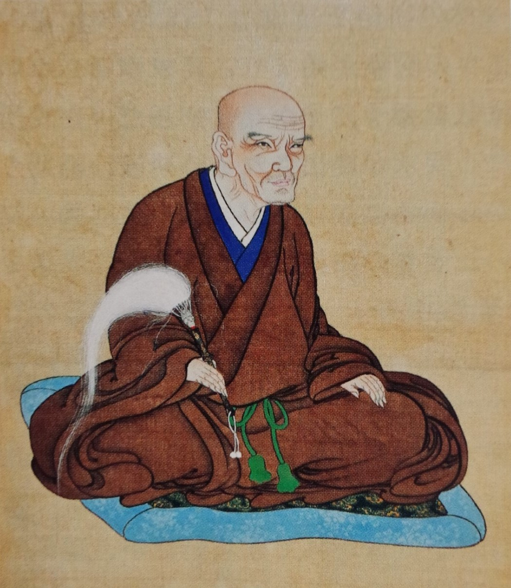 土岐頼康の肖像。